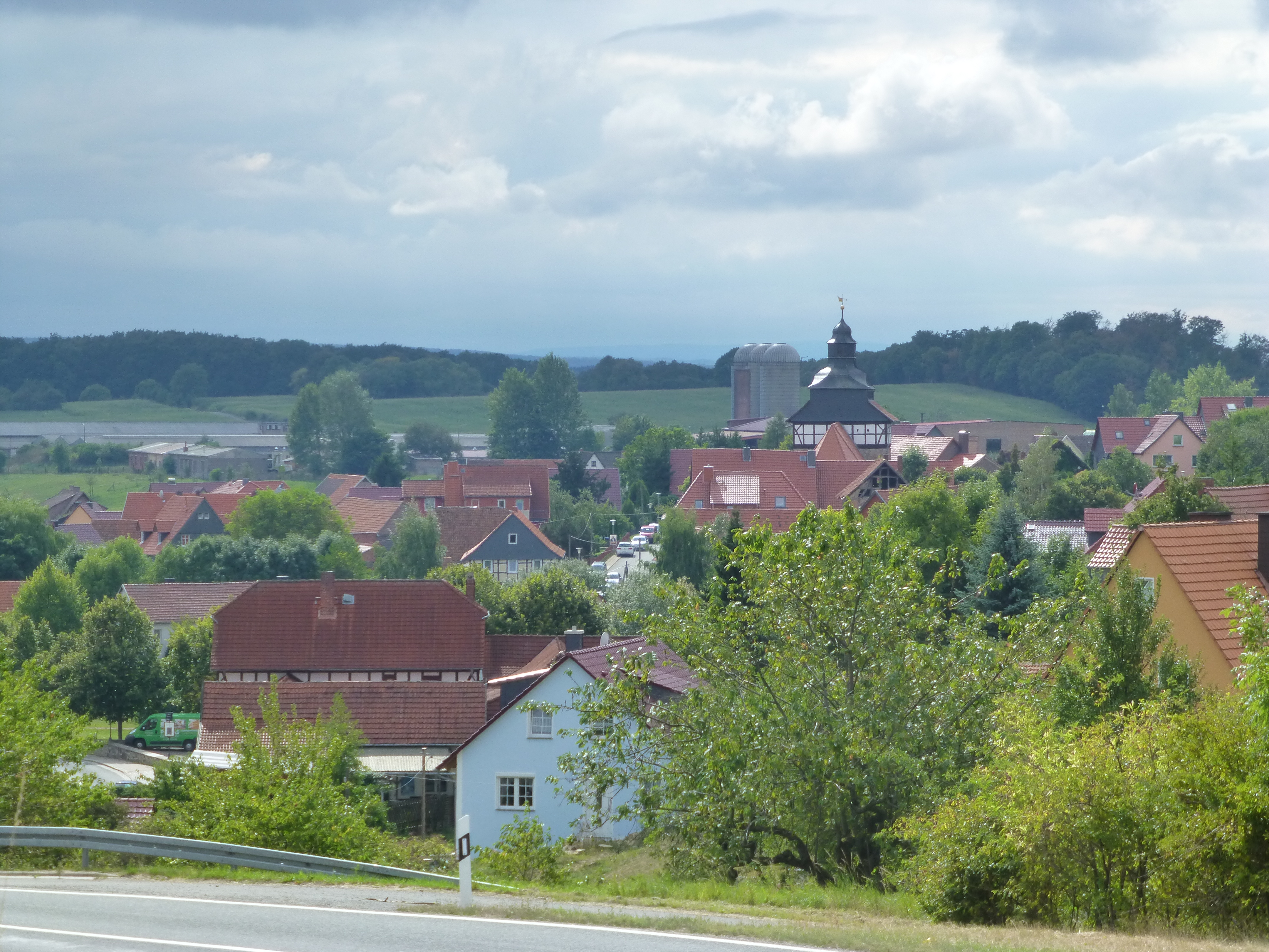 Kirchohmfeld im Ohmgebirge (mit Blick zum Kanstein)